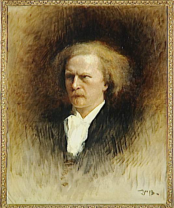 Portrait de Ignacy Paderewski Toile : 78 x 58 cm Don de Léon Bonnat à la ville de Bayonne en 1910